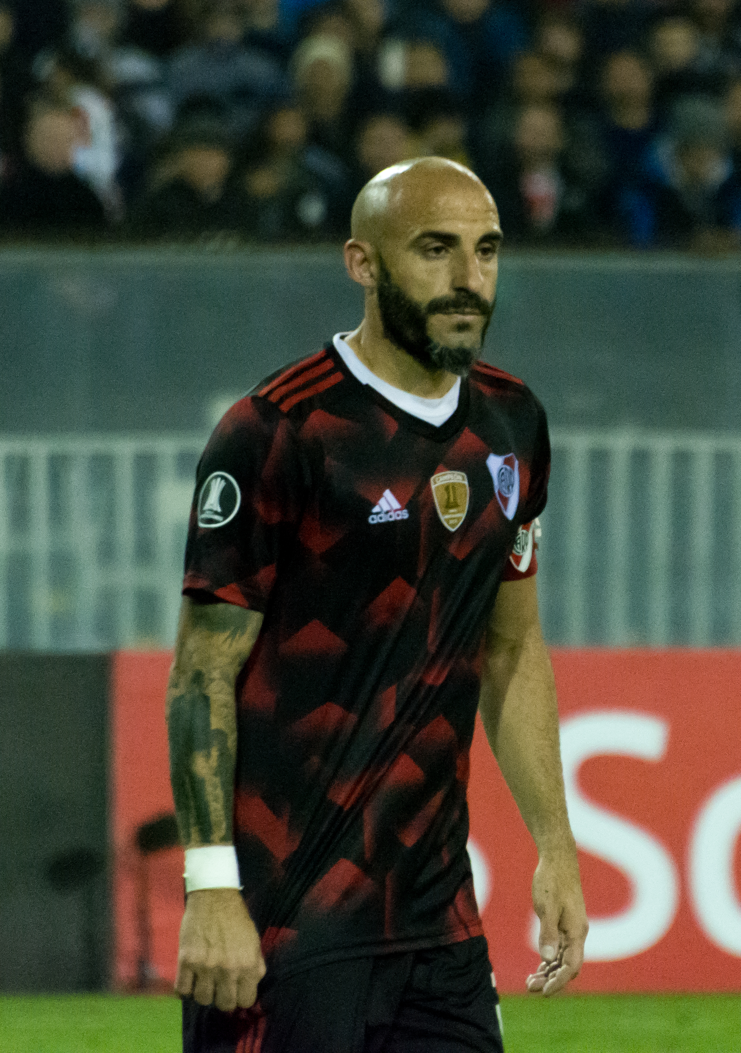 Palestino v River Plate, Estadio Monumental, Macul, Santiago, Región Metropolitana, Chile.